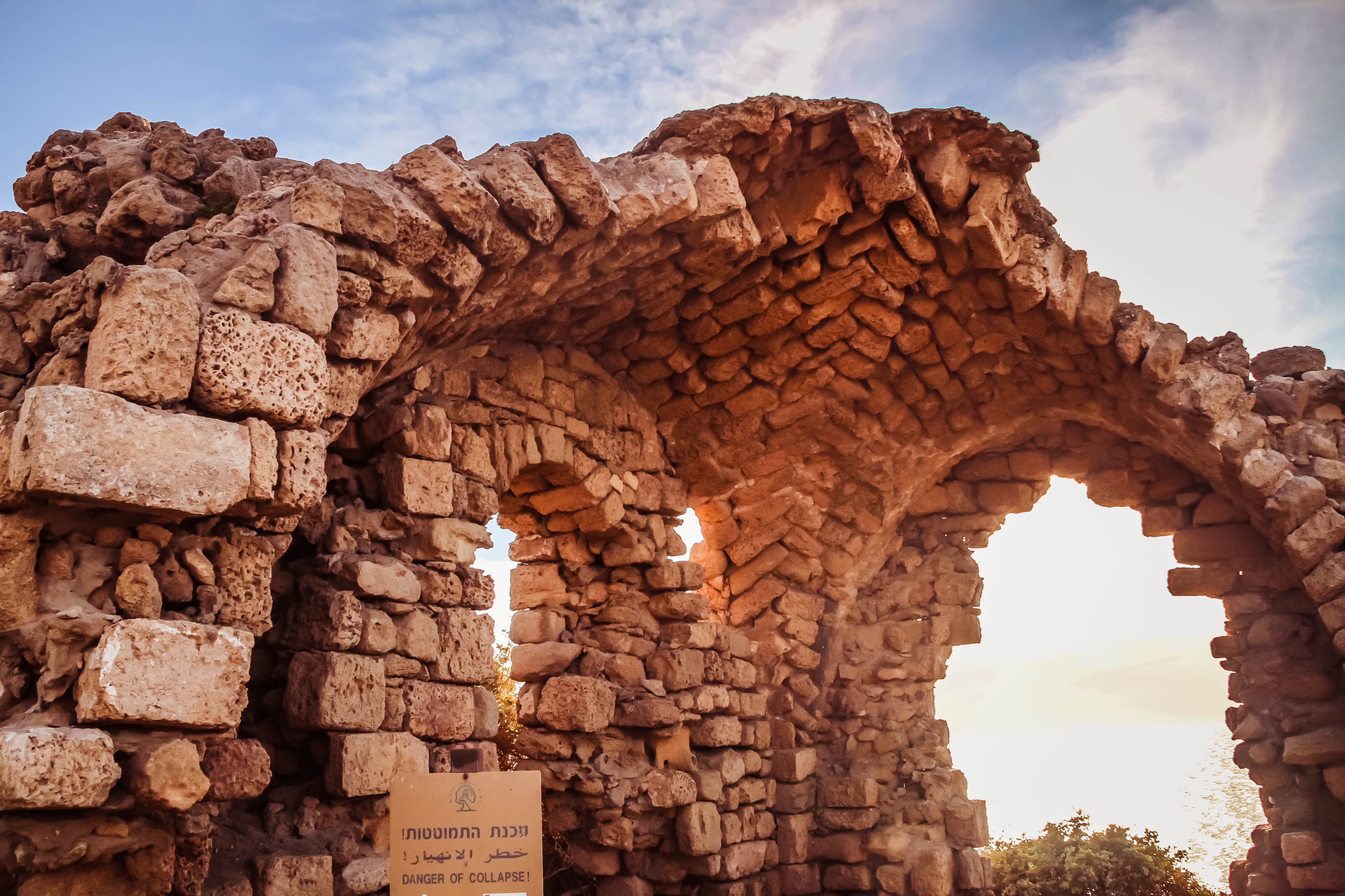 שרידים בגן הלאומי אשקלון